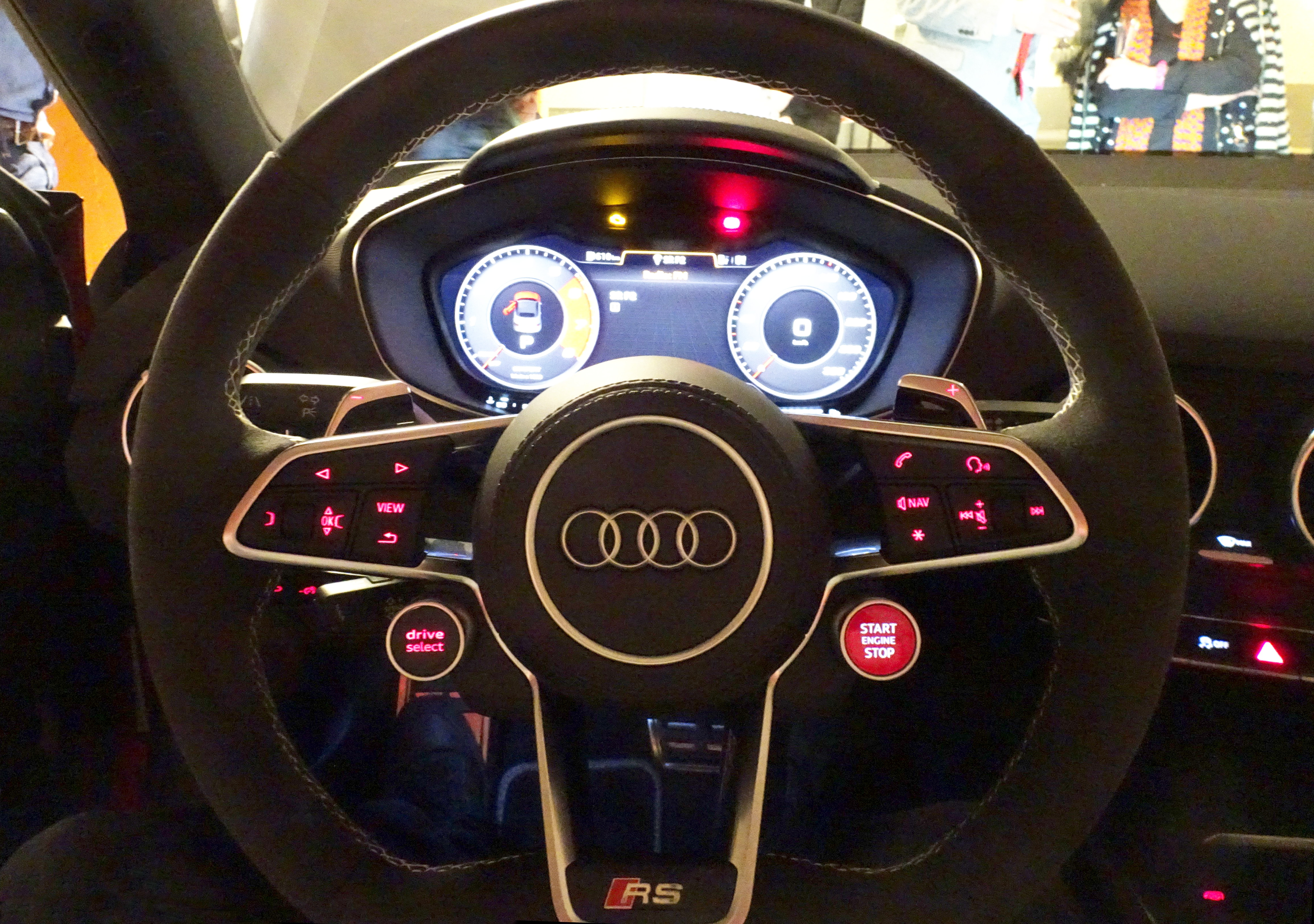 Audi Roadster TT RS, cockpit